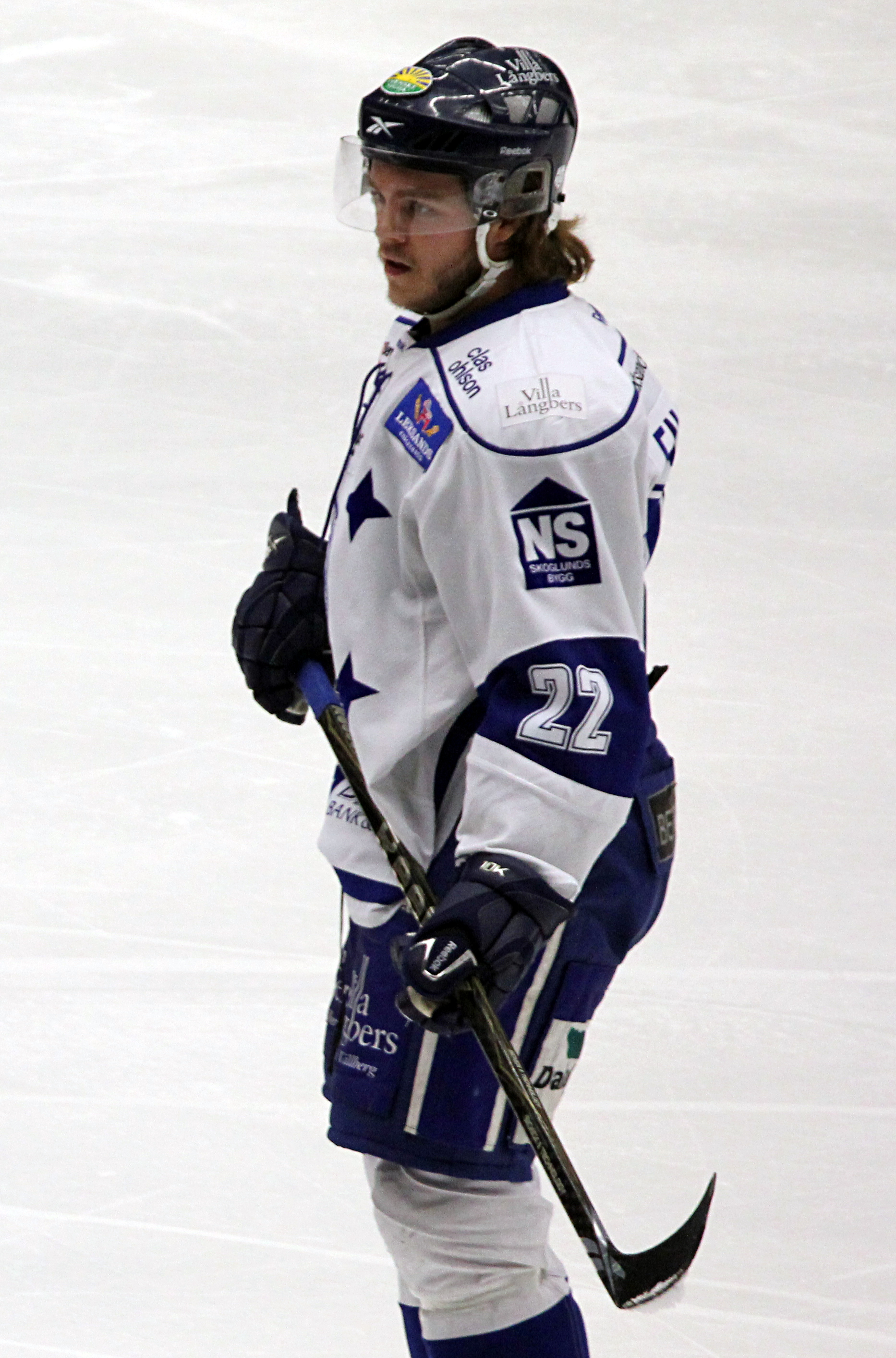 Tommy Enström för Leksands IF mot Västerås IK 29 januari 2011.